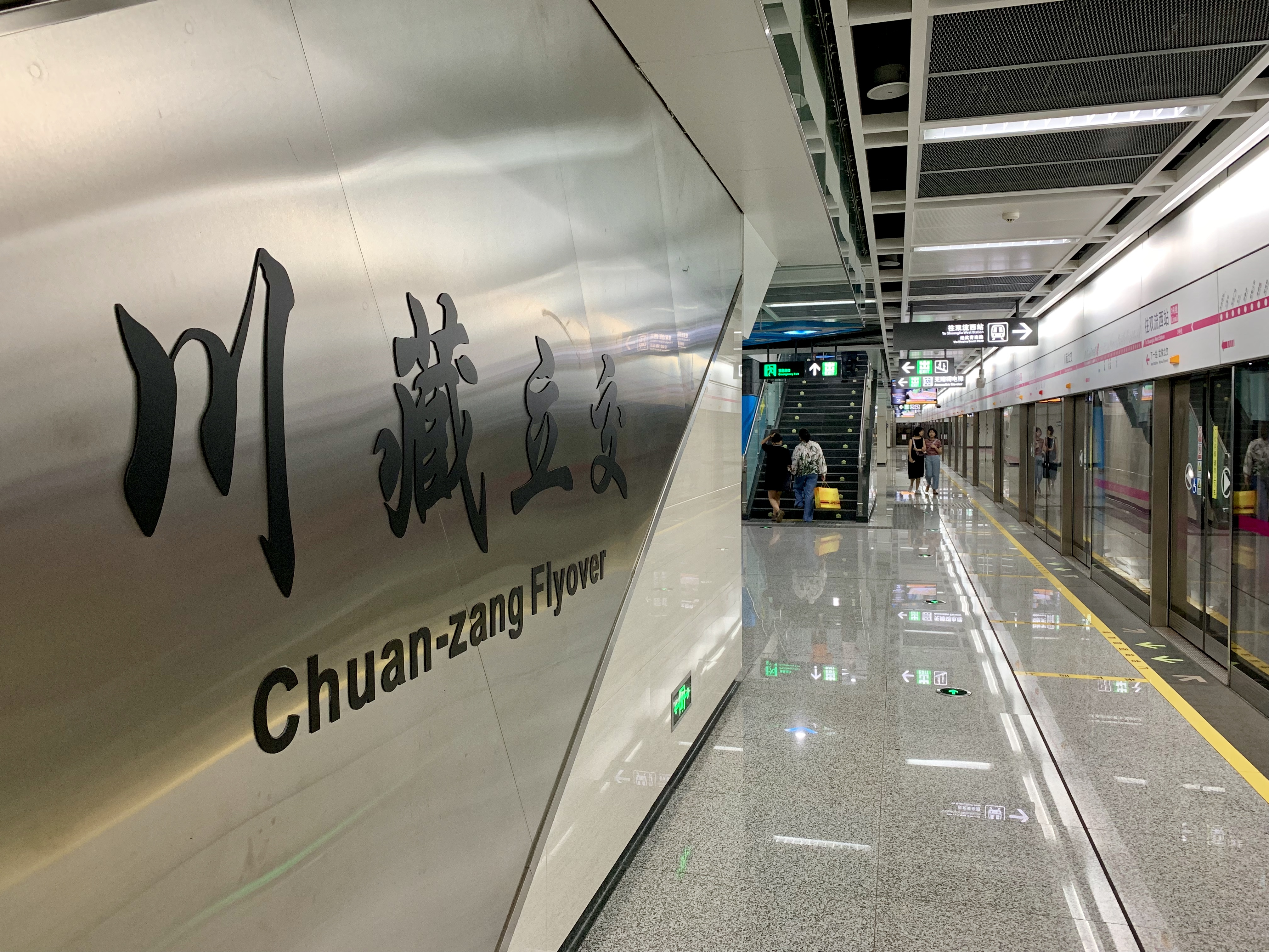 成都地铁川藏立交站